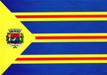 Bandeira do Município de Catanduva